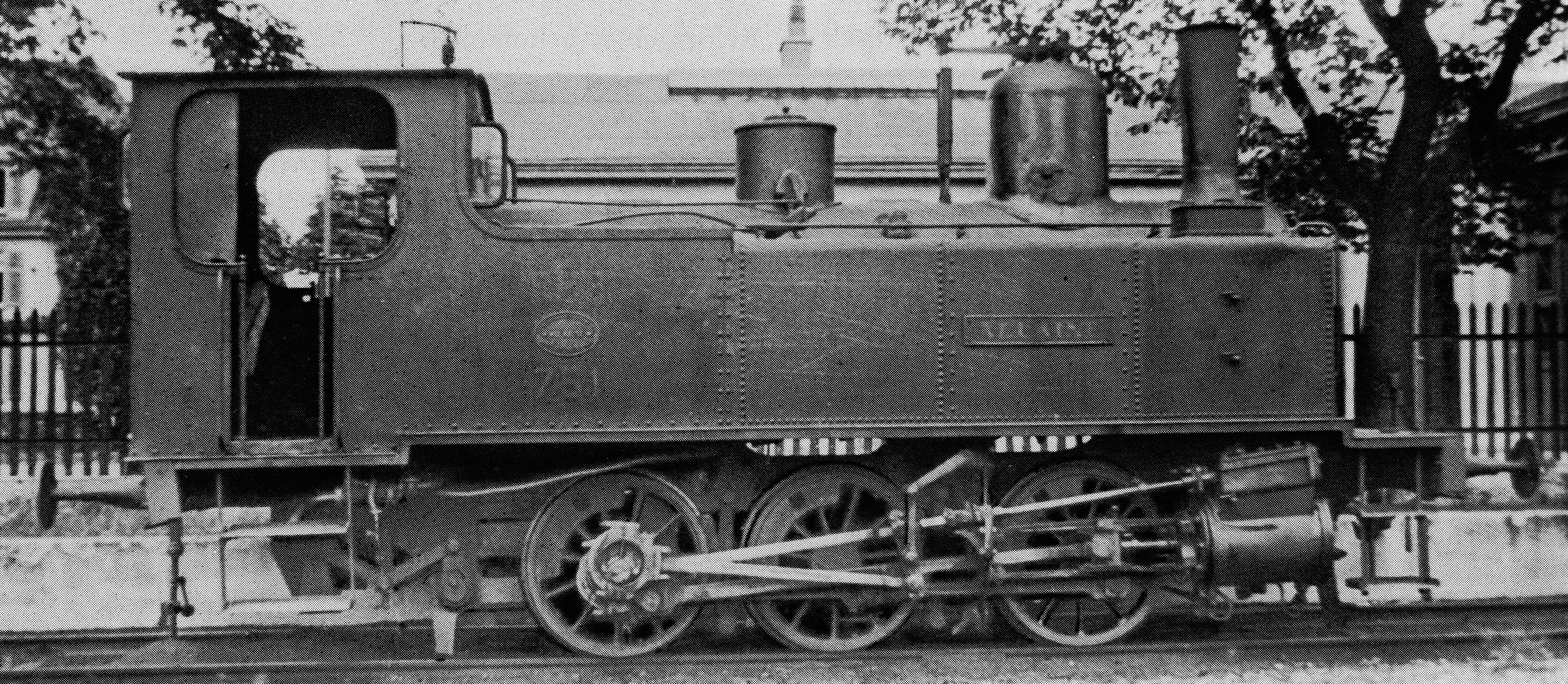 Tender-Locomotive E 3/3 (bis 1902 E 3) Nr. 751 Allaine der Jura-Simplon-Bahn, gebaut 1886 zů Mülhauſen von der Elſäſſiſchen Maſchinenbau-Geſellſchaft (Fabricationsnr. 3963) für die Geſellſchafft Suisſe-Occidentale-Simplon zum Betribe auf deren neueröffneten Strecke Pont—Vallorbe als Nr. 201 Le Risoux, 1891 von der Jura-Simplon-Bahn übernommen, ab 1901 auf der neuen Strecke Brunntrutt—Pumpfel eingeſetzt, ab 1929 als Rangirlocomotive Nr. 5 im Dreiſpitz zů Baſel, 1948 außer Dienſt geſtellt und anſchließend abgebrochen.